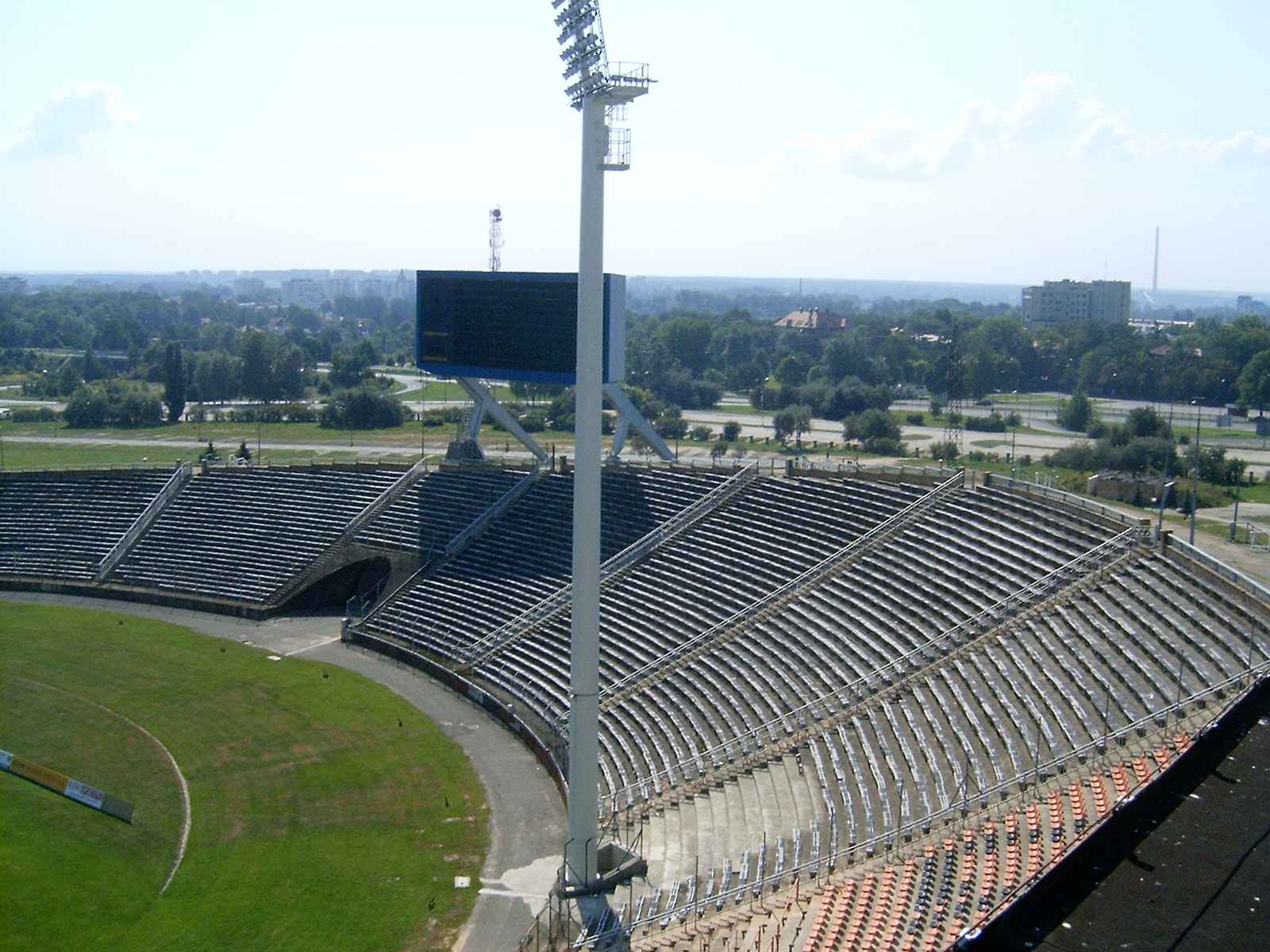 Lubin - stadion Zagłębia Lubin